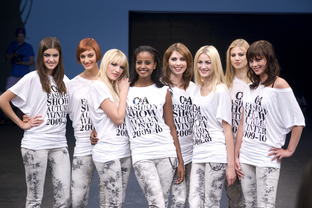 Finalisten der vierten Staffel von GNTM auf der Präsentation von C&A im April 2009. Marie Nasemann, Maria Beckmann, Sarina Nowak, Sara Nuru, Ira Meindl, Mandy Bork, Larissa Marolt und Jessica Motzkus (v.l.n.r.)